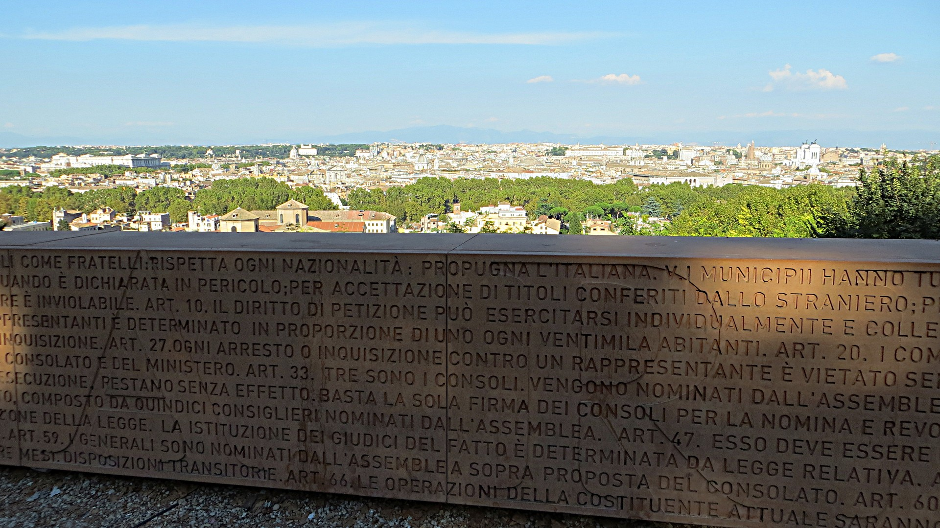 Roma, Muro della Costituzione della Repubblica Romana del 1859 sul belvedere del Gianicolo, inaugurato il 17 marzo 2011, nell’anniversario del 150° dell’Unità d’Italia.